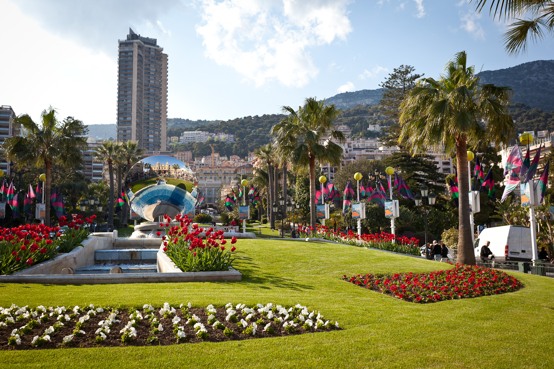 Monaco